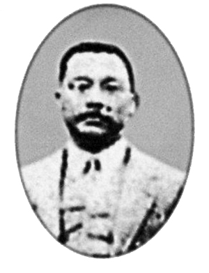 胡毅生